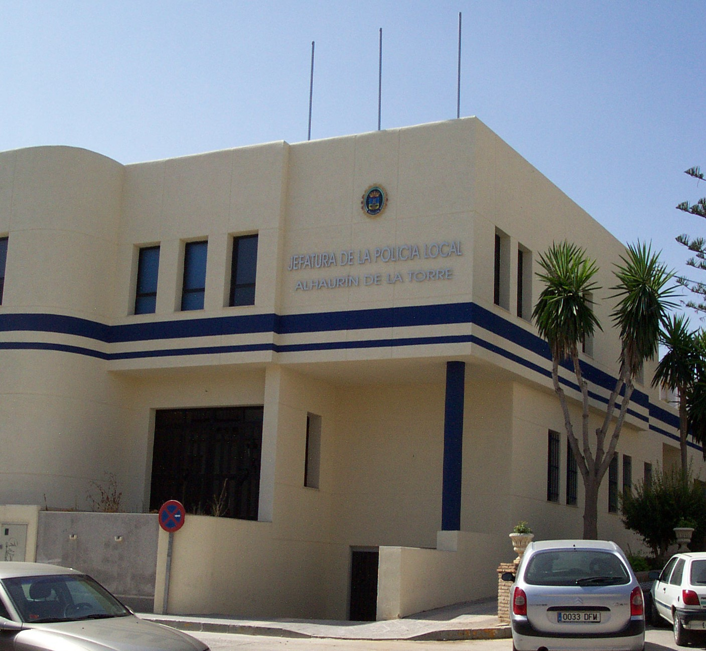 Alhaurín de la Torre, Spain.